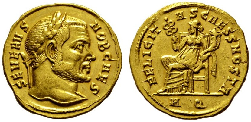 SEVERUS II. 306-307. Aquileia. Aureus. Als Caesar. Vorderseite: SEVERVS NOB CAES Belorbeerter Kopf r. Rückseite: FELICITAS CAESS NOSTR Felicitas thront l. mit Caduceus und Füllhorn.